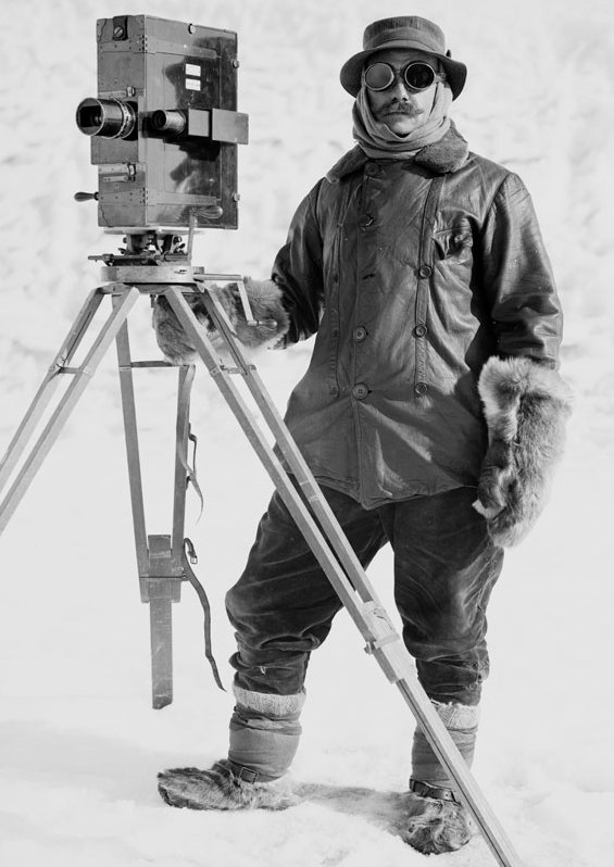 Self-portrait